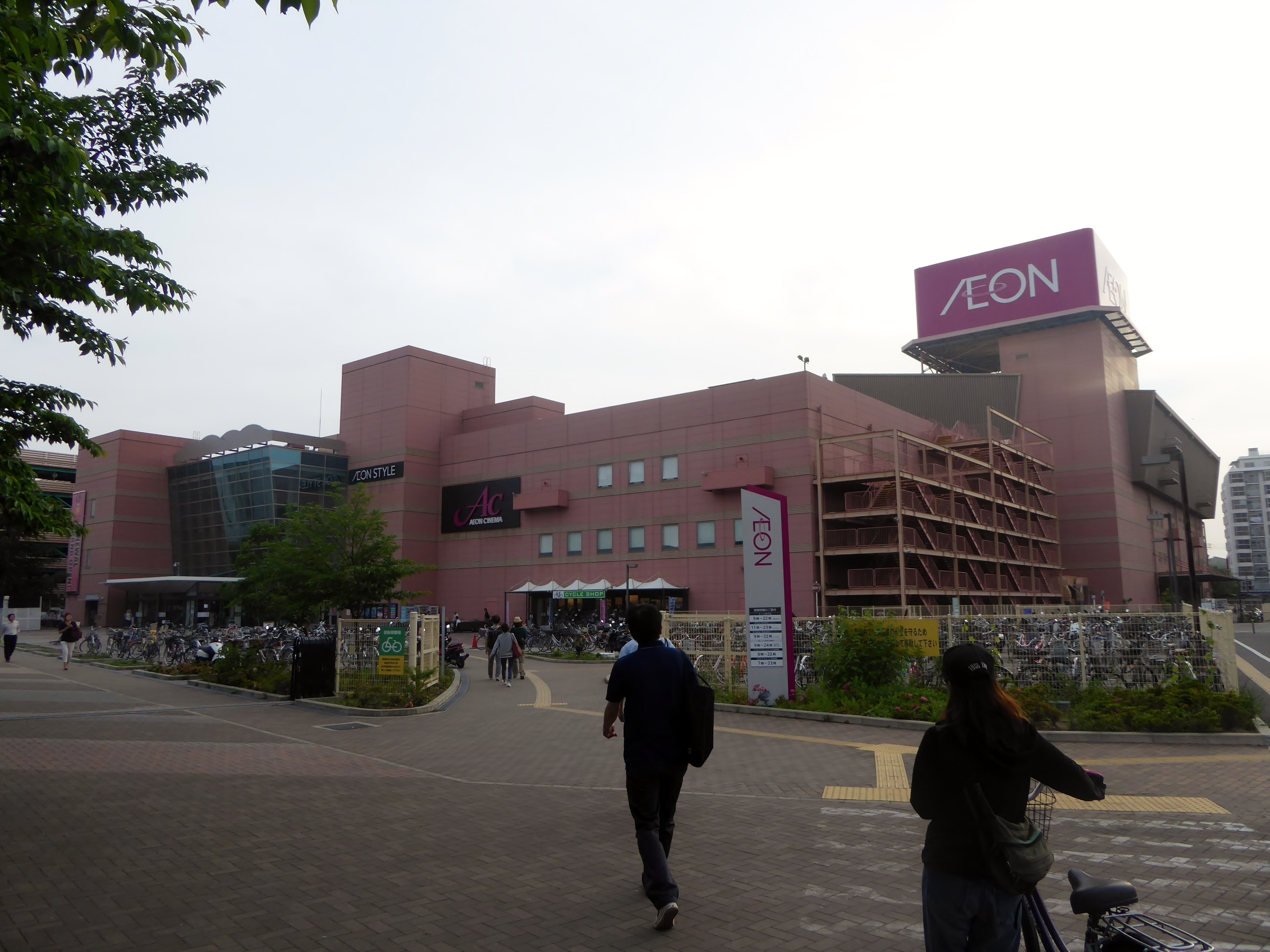 イオンモール茨木を撮影。